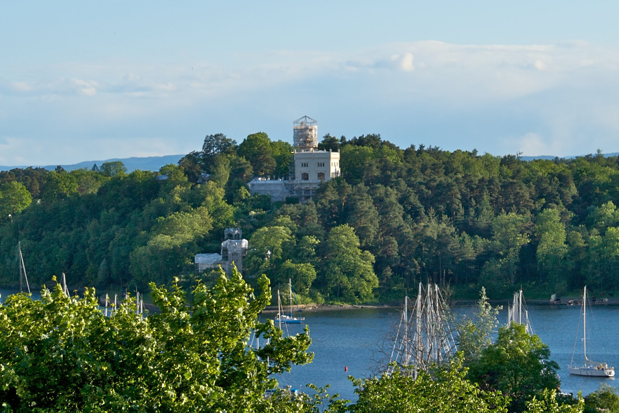 Oscarshall sett fra Gimlehøyden.